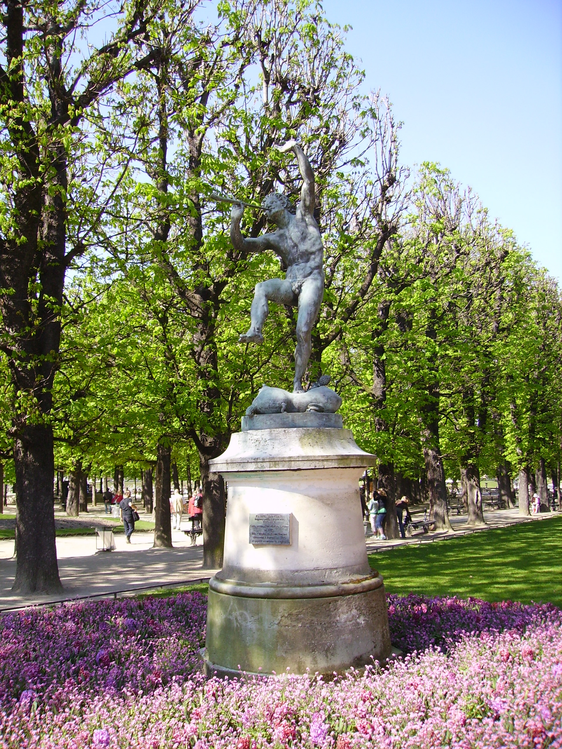 Eugène-Louis Lequesne (1815-1887): Le faune dansant (1851), Paris, Jardin du Luxembourg.